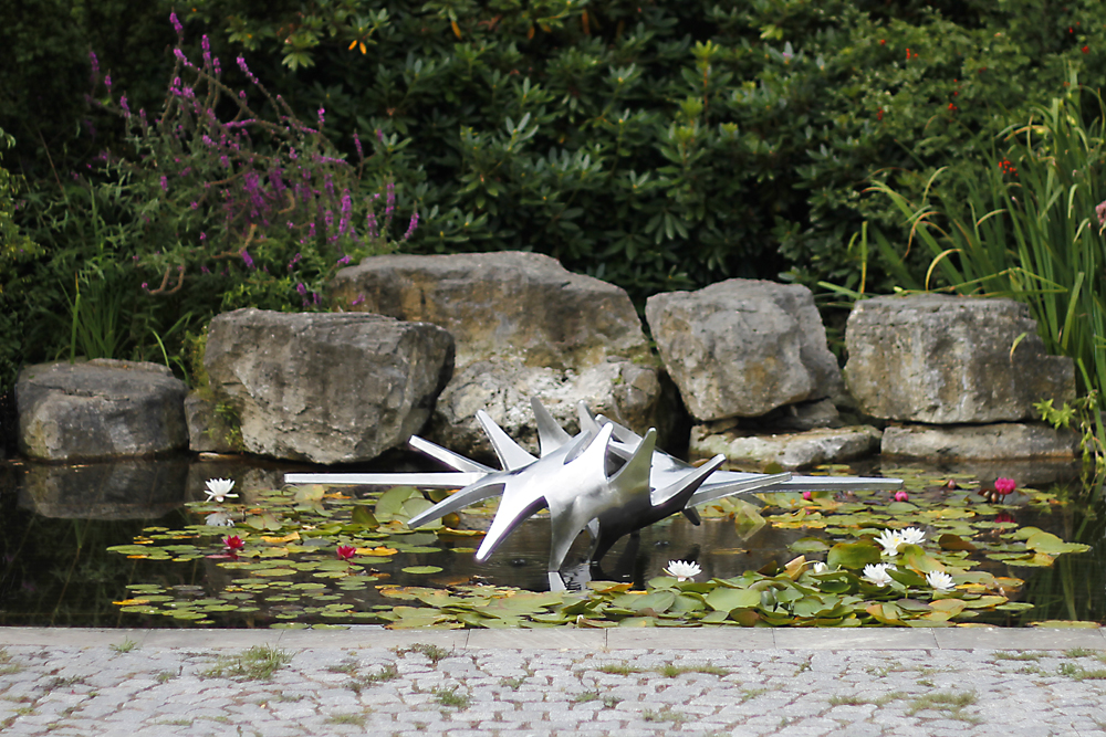 Schöpfungstag1